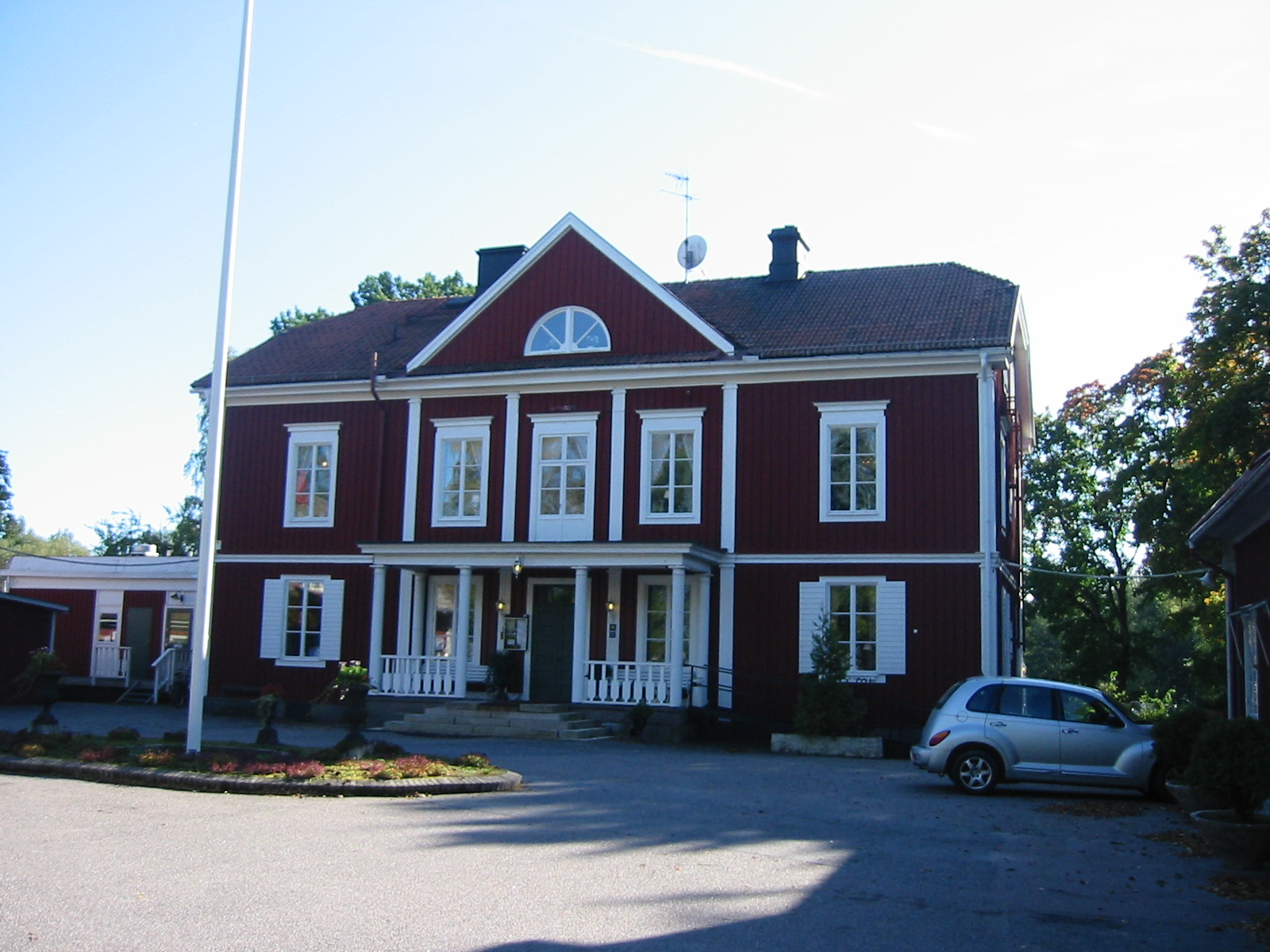 Kolbäcks gästgiverigård